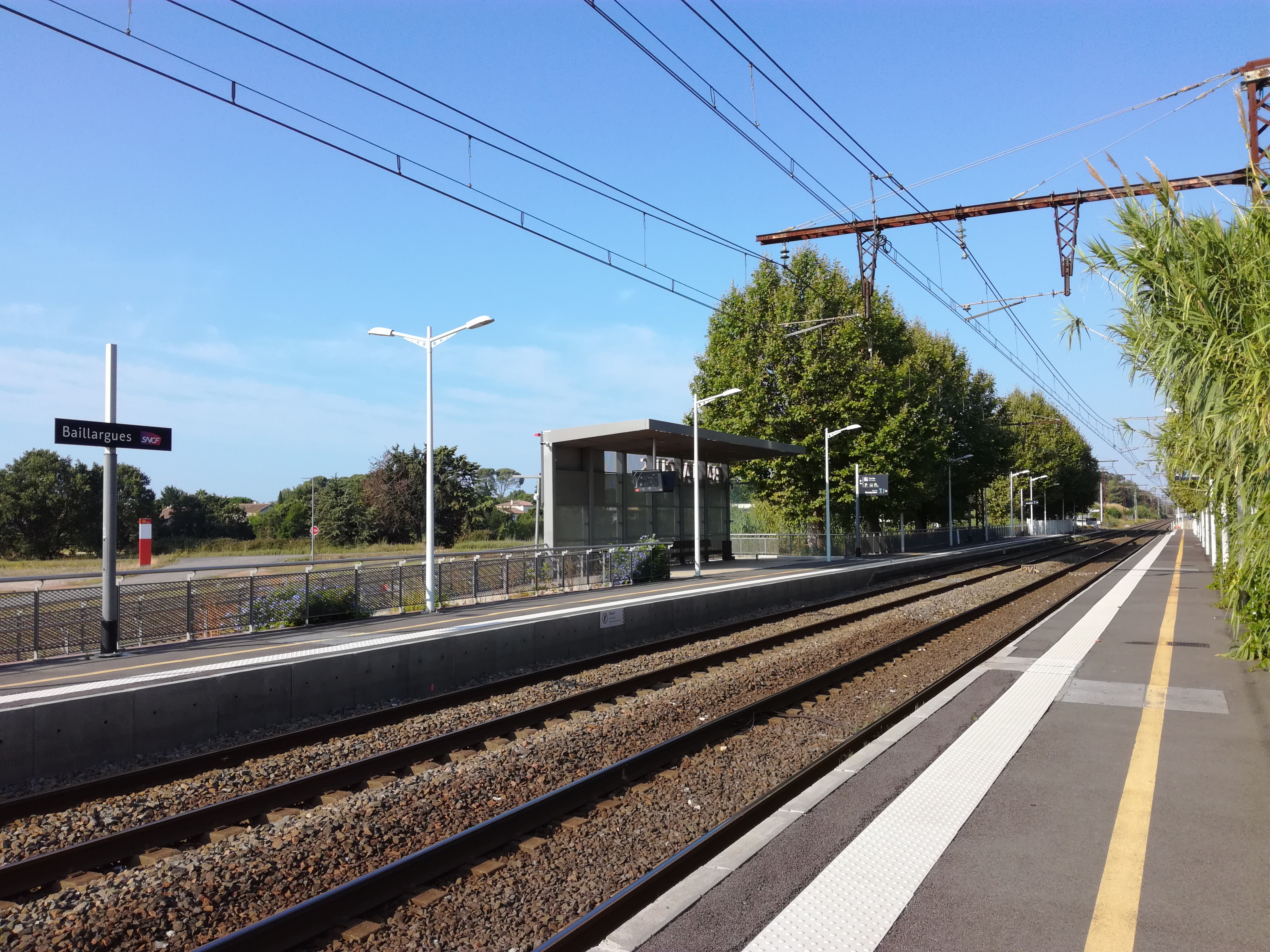 Gare de Baillargues - vue des quais et des voies, direction Montpellier